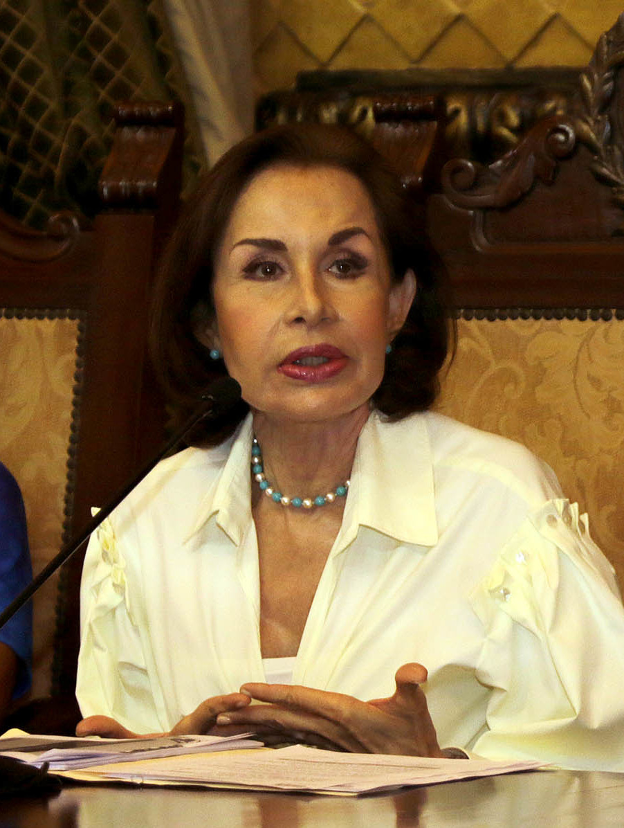 Guayaquil, lunes 30 de julio del 2018 (Andes).-El departamento de turismo del municipio de Guayaquil presentó la tercera edición del Comic Con que se realizará en Agosto Foto:César Muñoz/Andes